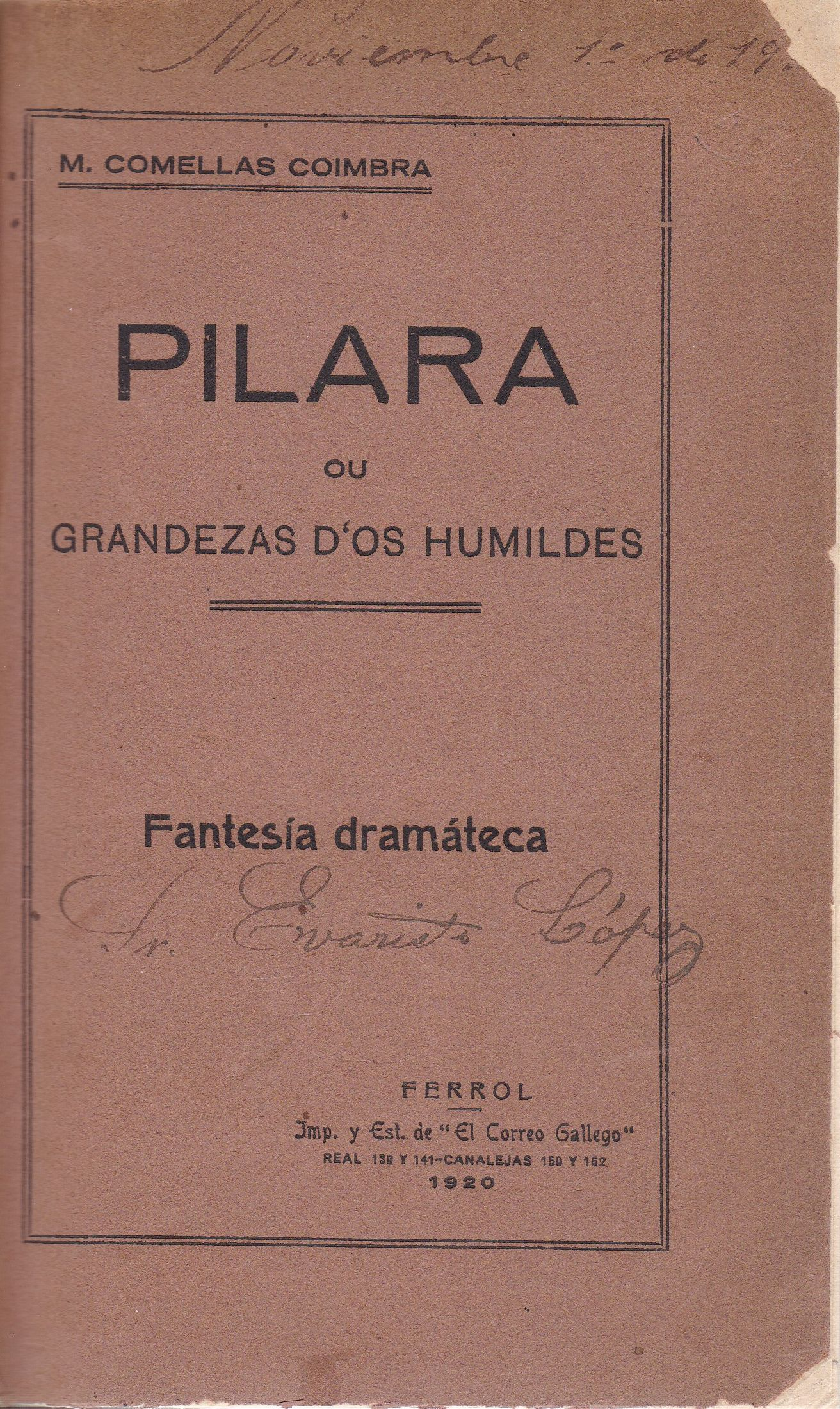 Portada do libro Pilara de Manuel Comellas Coímbra